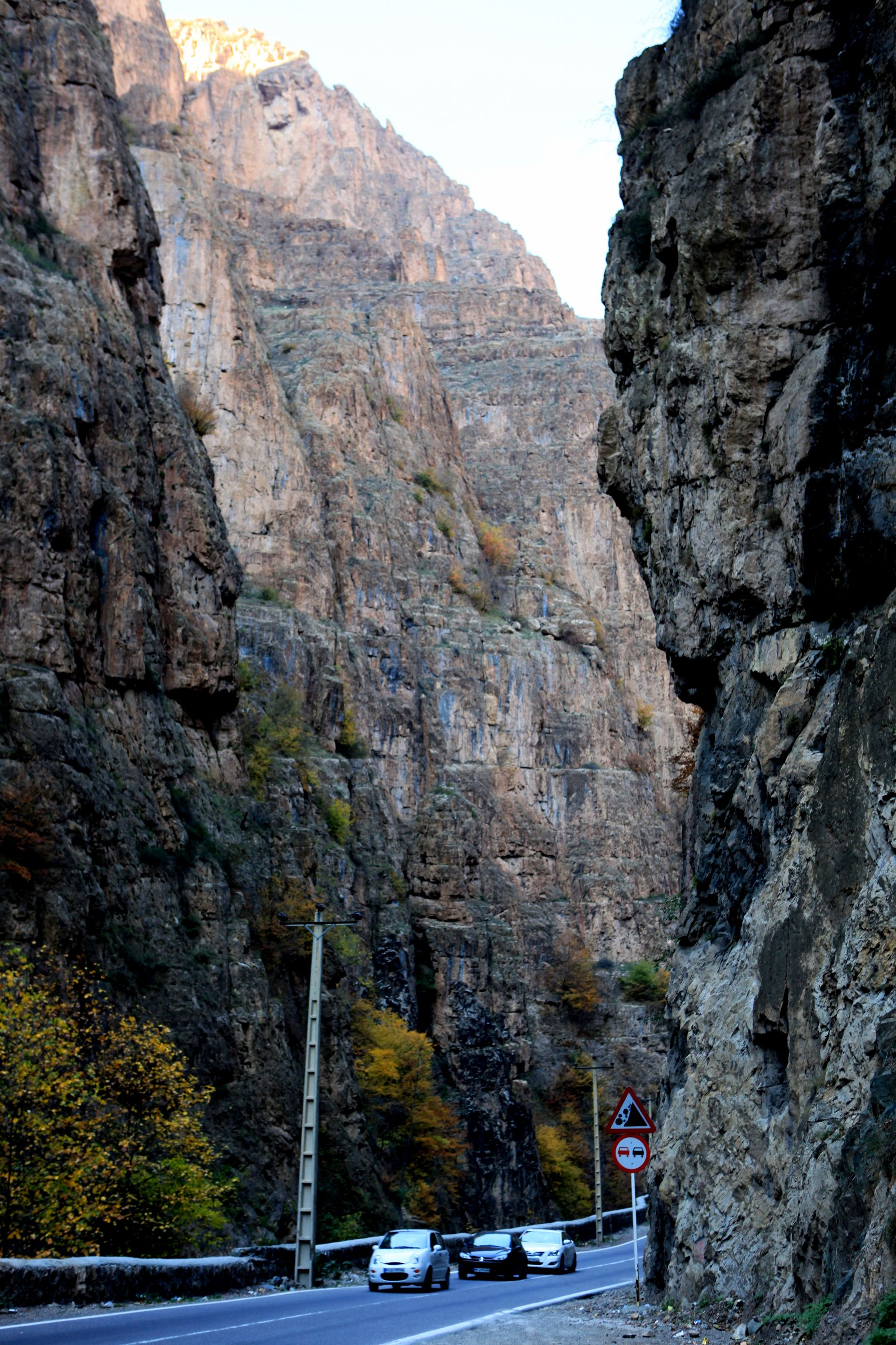 Chalus road, Mazandaran